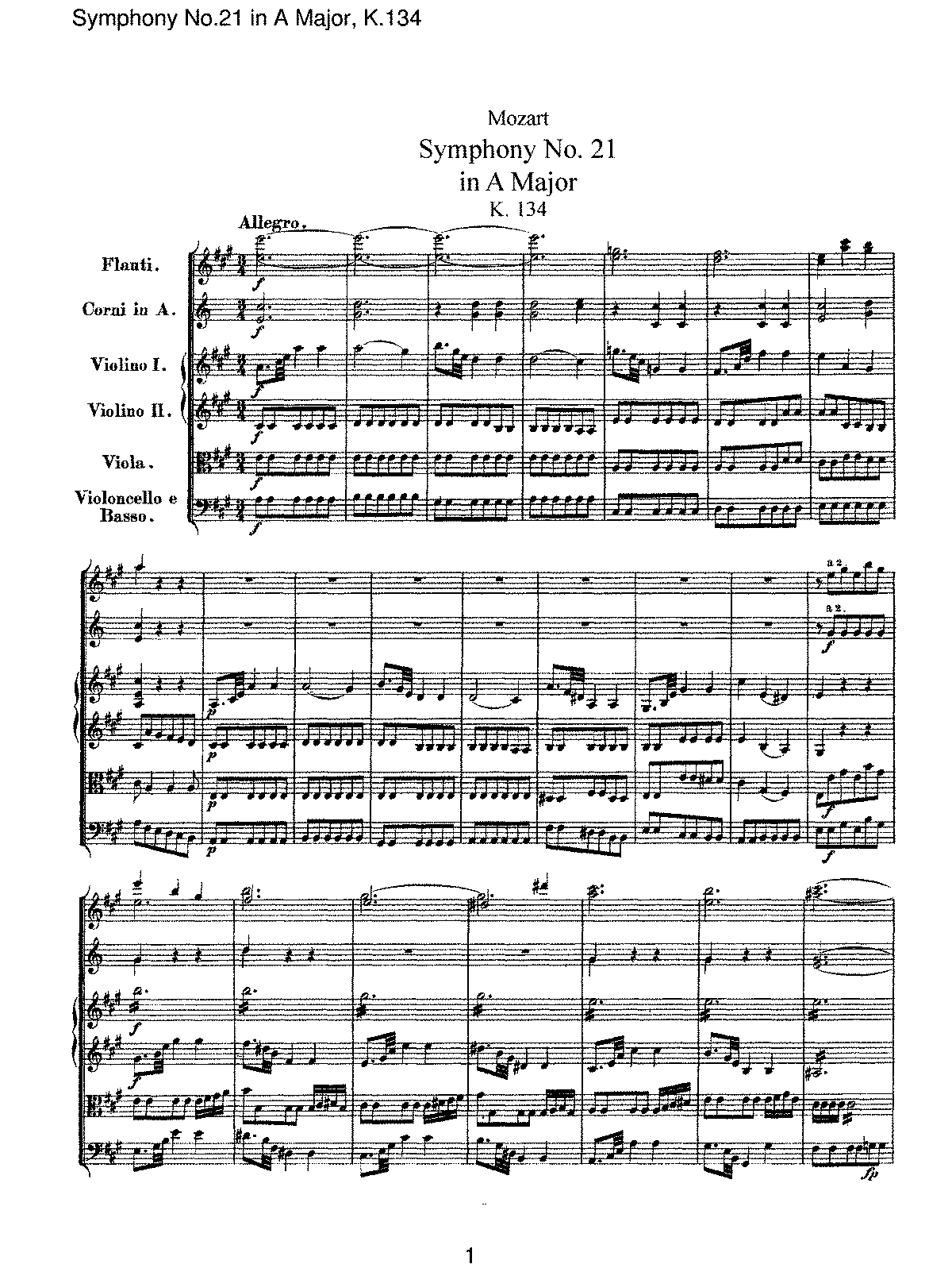 پارتیتور صفحه ی اول سمفونی شماره ی 21 ، اثز ولفگانگ آمادئوس موتزارت